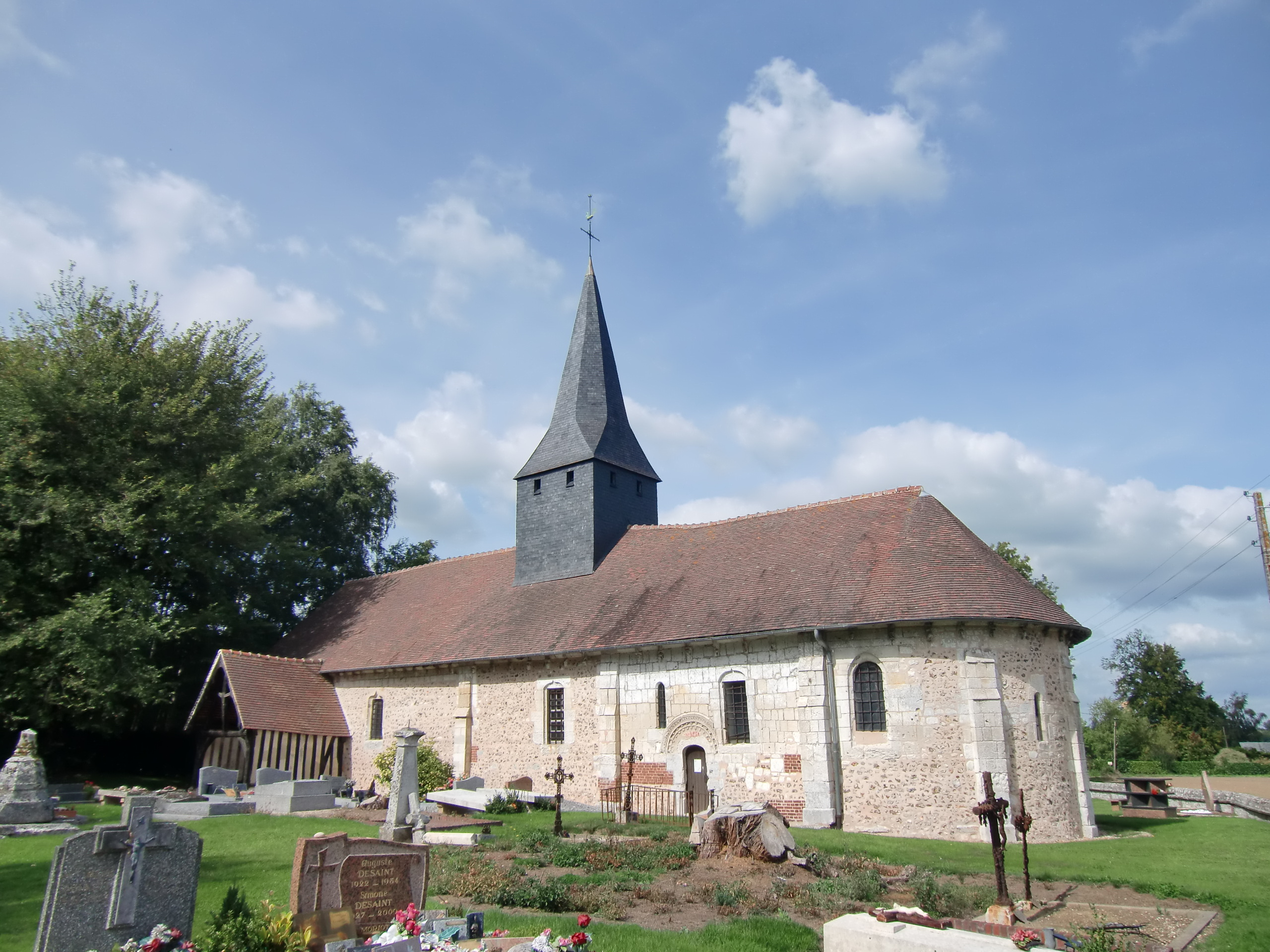 église de La-Trinité-de-Thouberville (Eure, Normandie, France)